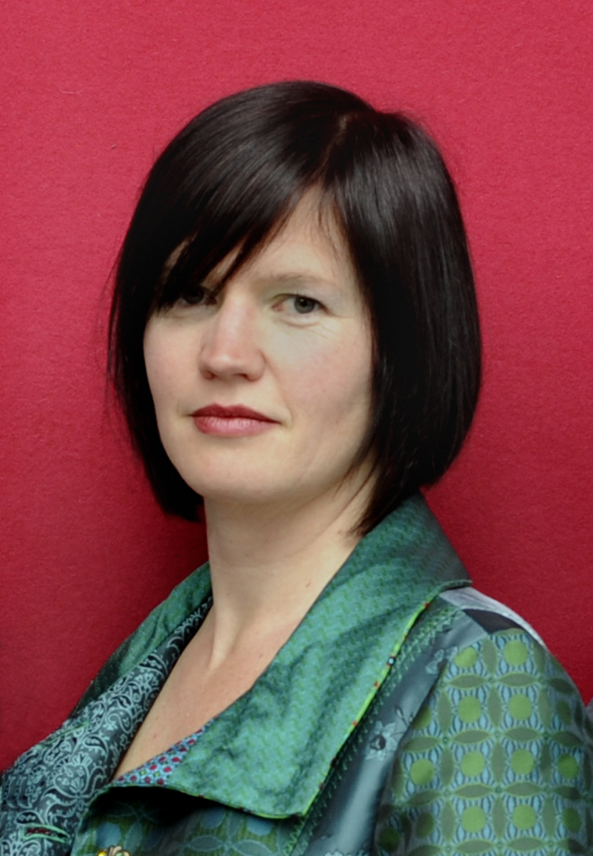 Daphne Maria Keune (Amsterdam, 1971) is een Nederlands pianiste.